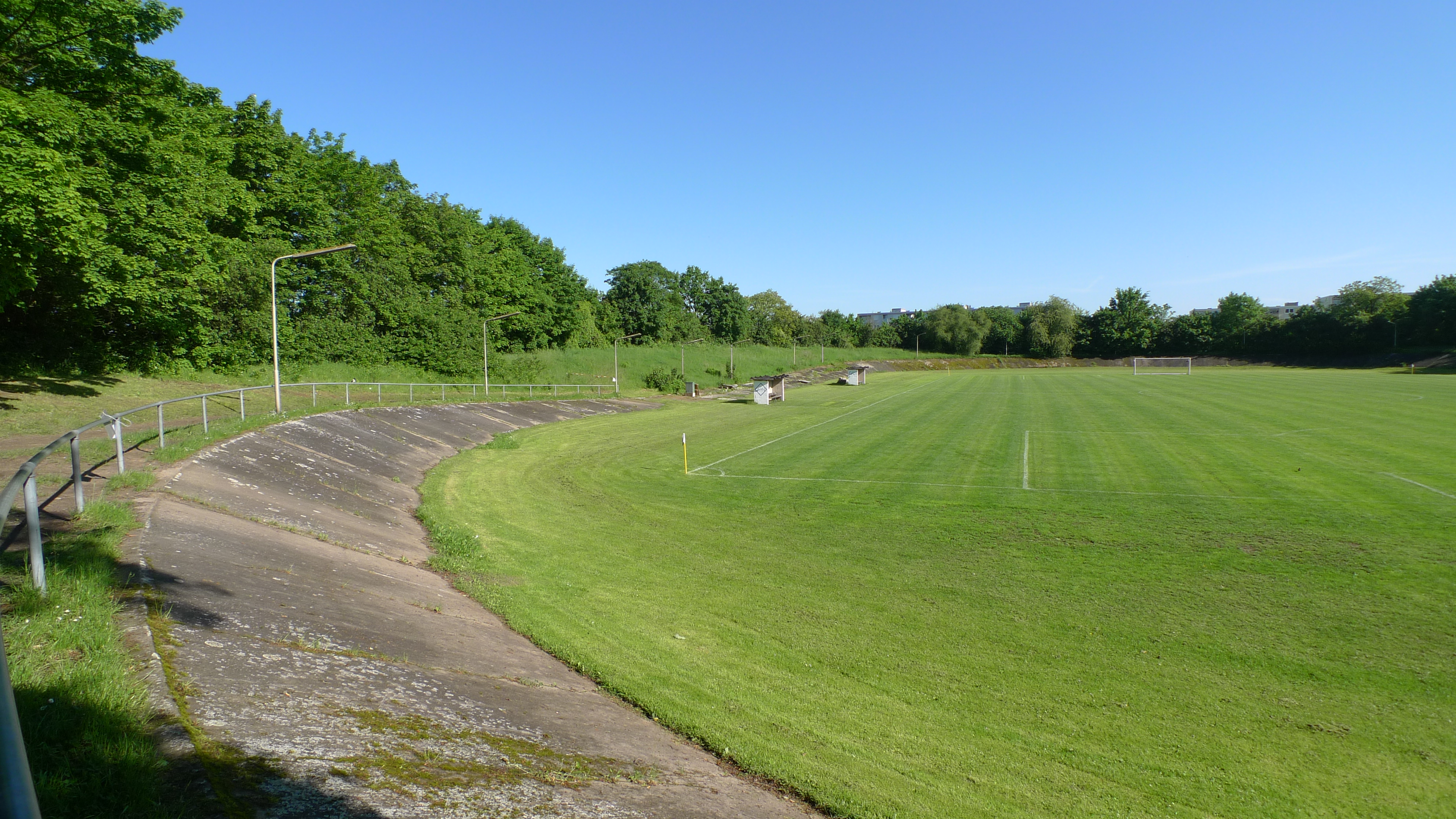 Ehemalige ASN Radrennbahn und heutiges Fußballstadion des ASN Pfeil Nürnberg